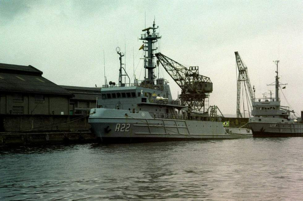 O RbAM Tridente - R 22, atracado no cais do 1º Distrito Naval na Ilha das Cobras, Rio de Janeiro, tendo ao fundo o então Navio-Auxiliar Trindade - U 16. Marinha do Brasil - Naval ship of Brazil - Towboat.